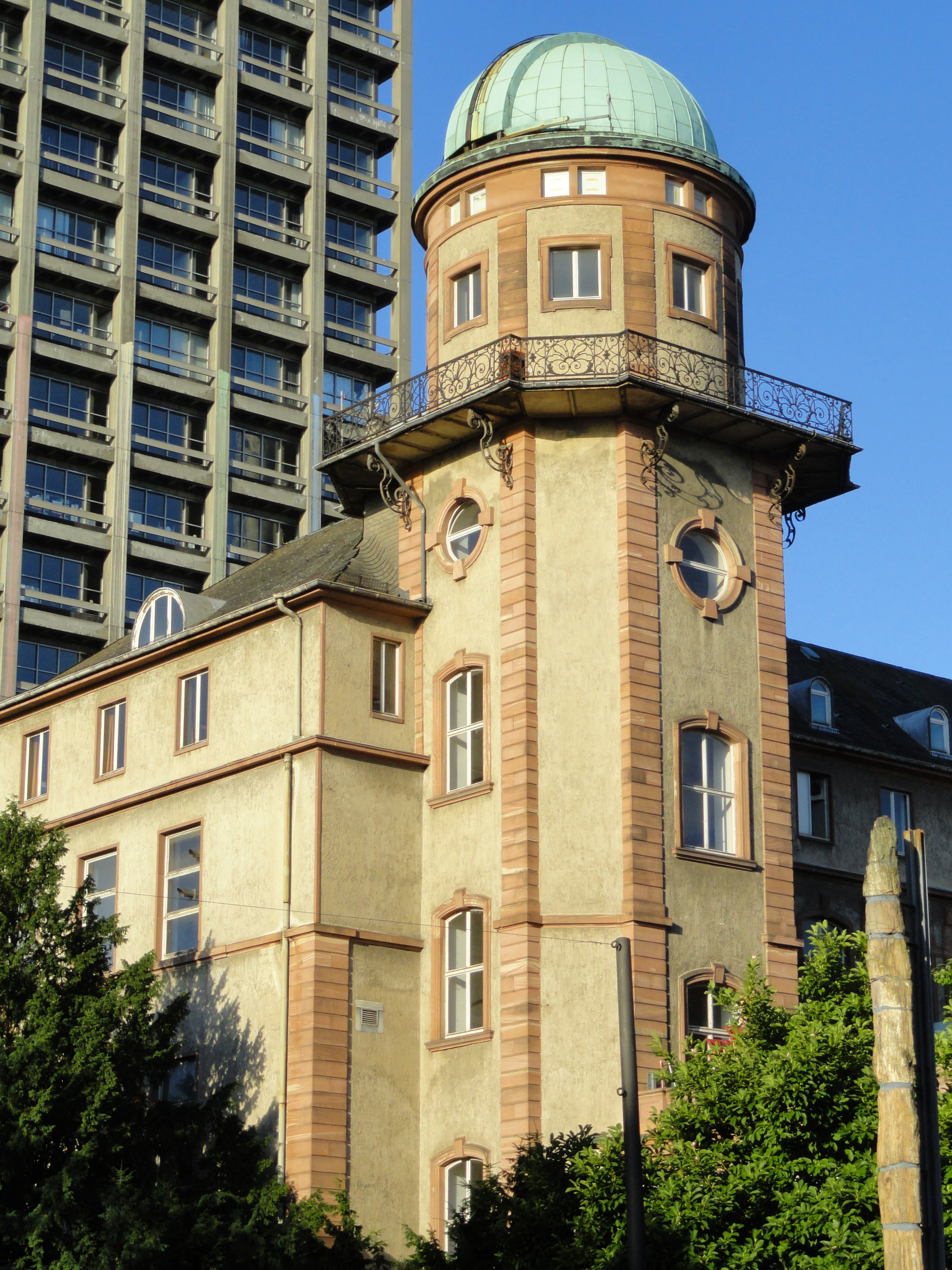 Physikalischer Vereinz, near the Naturmuseum Senckenberg, Frankfurt am Main, Germany.